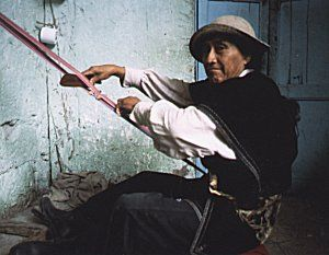 Muškarac za tkalačkim stanom. Kañari-Mann am Webstuhl. Kañari qhari awaq. Suradnik:Zeljko-pa rurasqan.